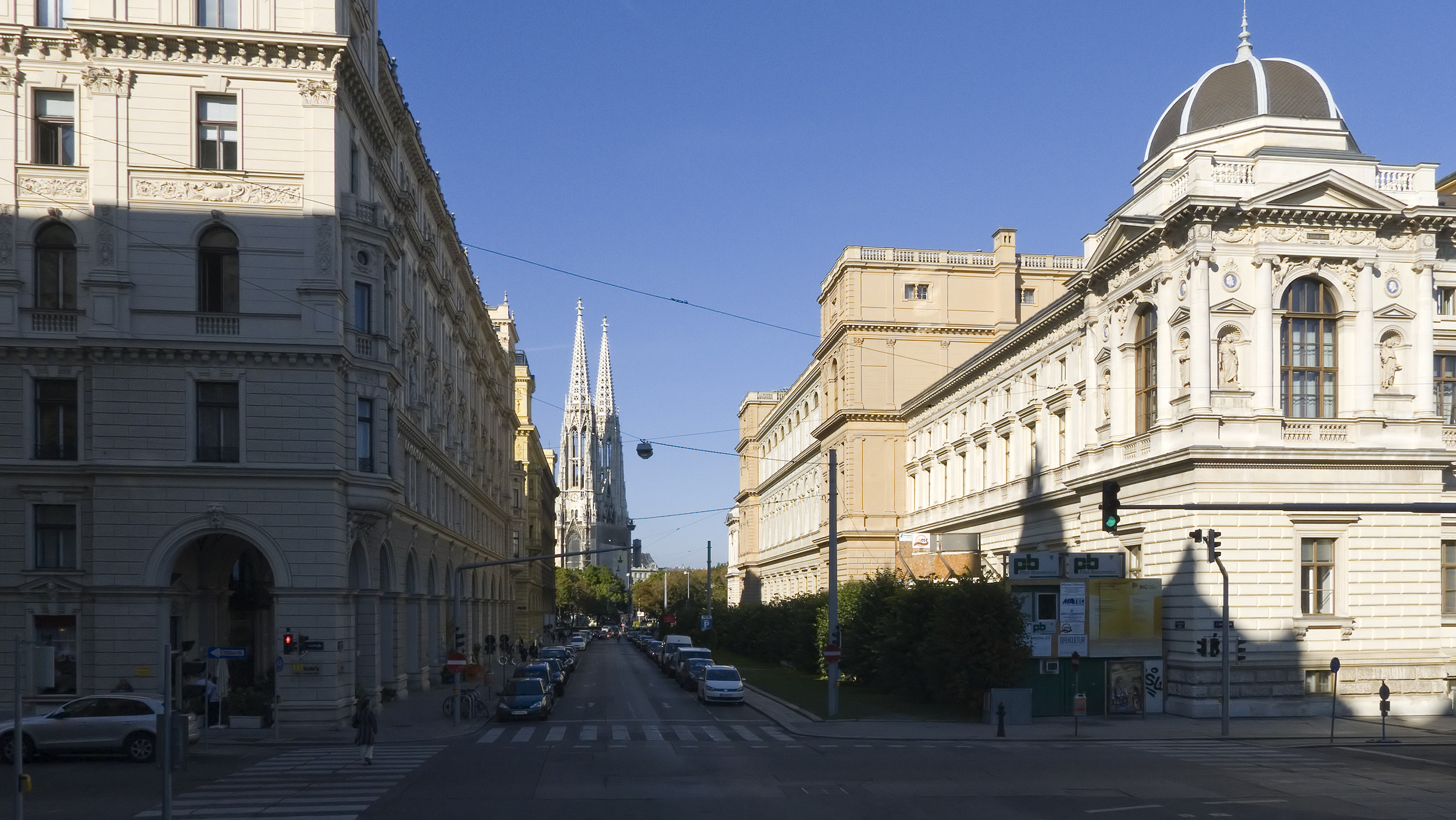 Reichsratsstraße in Wien 1 bei Nr. 11 Richtung Norden